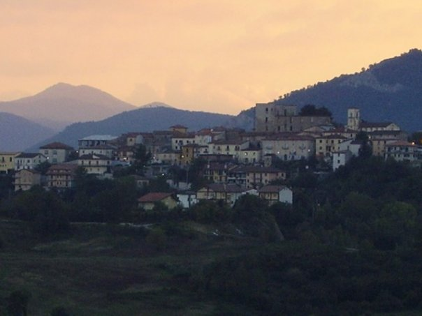 Panorama di Capriglia Irpina